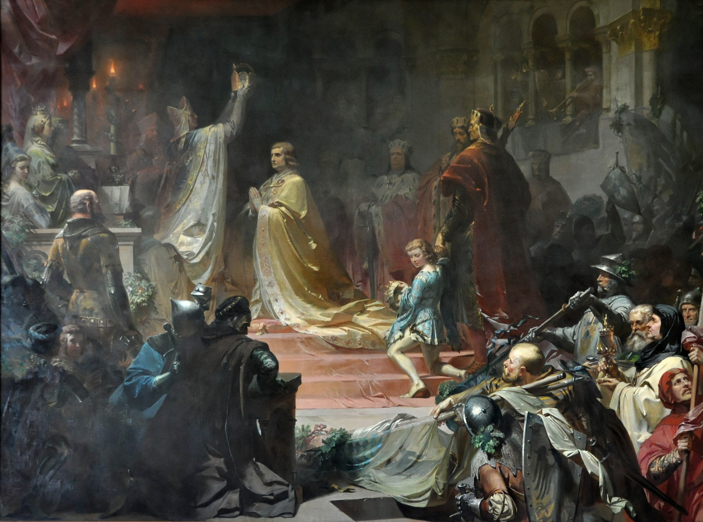 DIe Kaiserkrönung Ludwig des Bayern in Rom (1328); Maximilianeum München